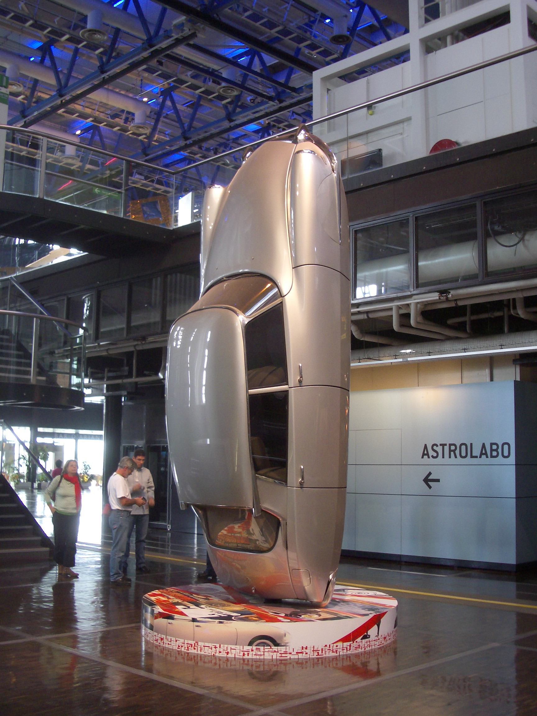 Showroom Citroën Paris